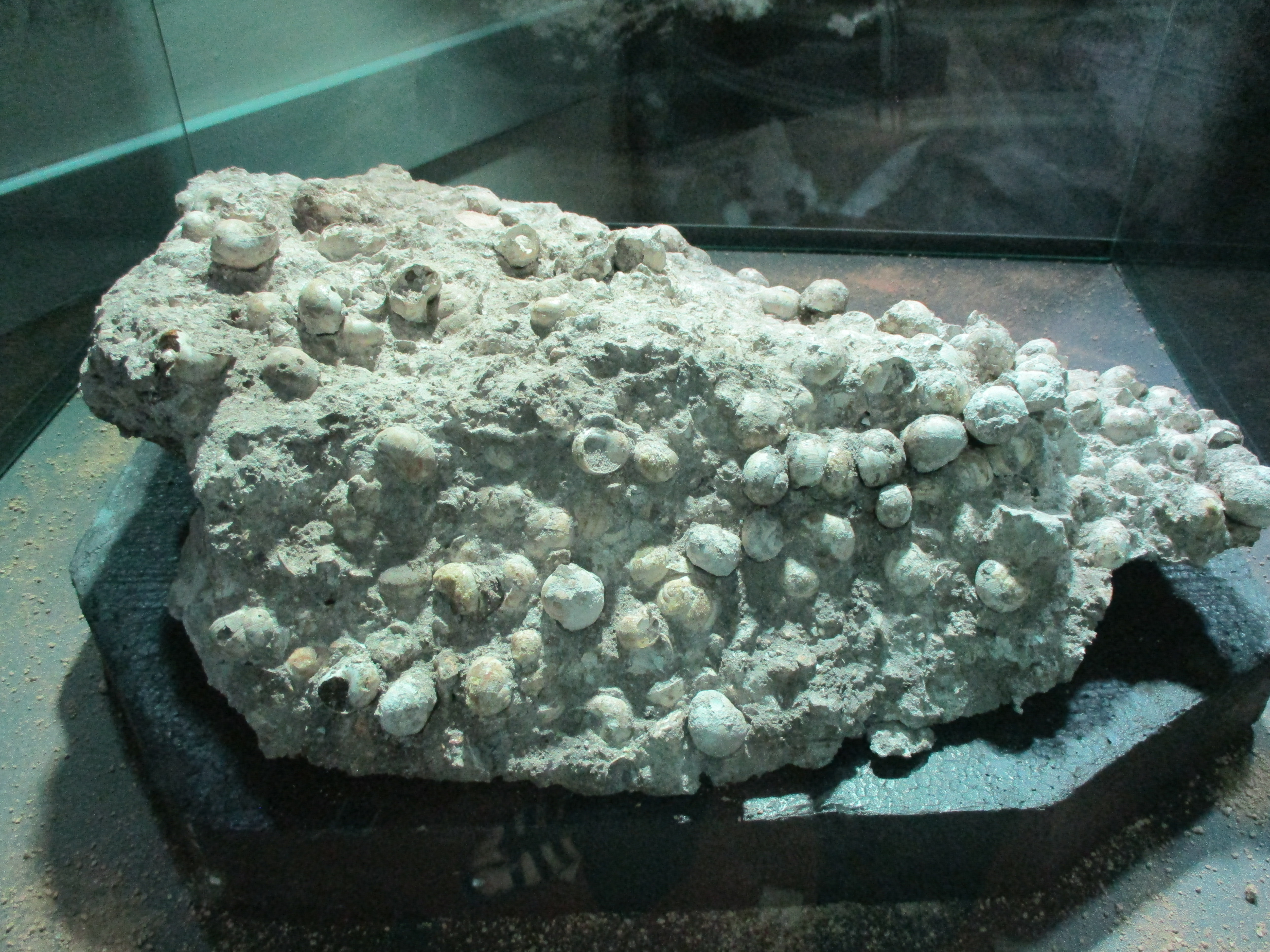 Chiocciolaio del Fucino risalente a 11 mila anni fa